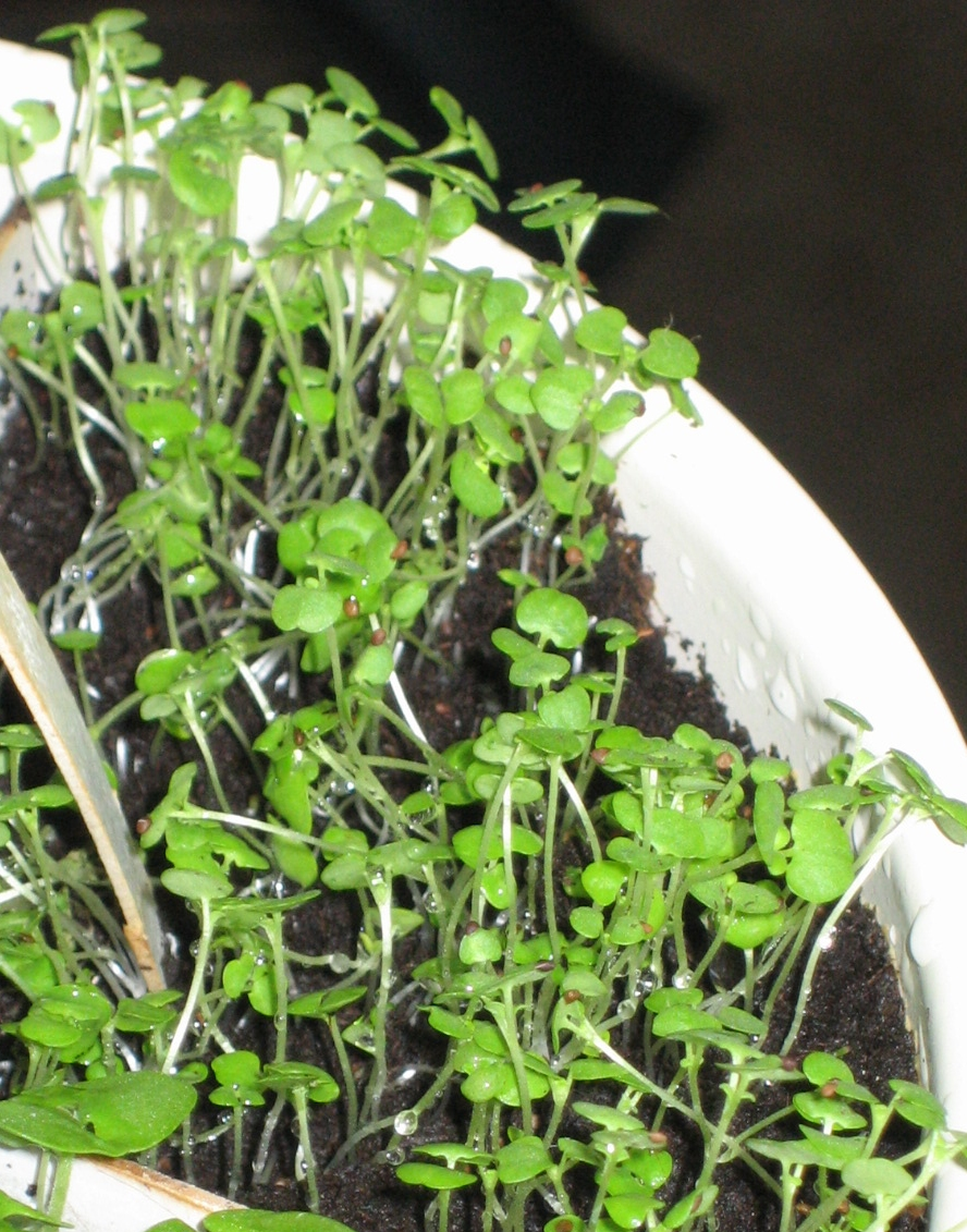 Marjoram, Majeranek, Origanum majorana, 12 days old